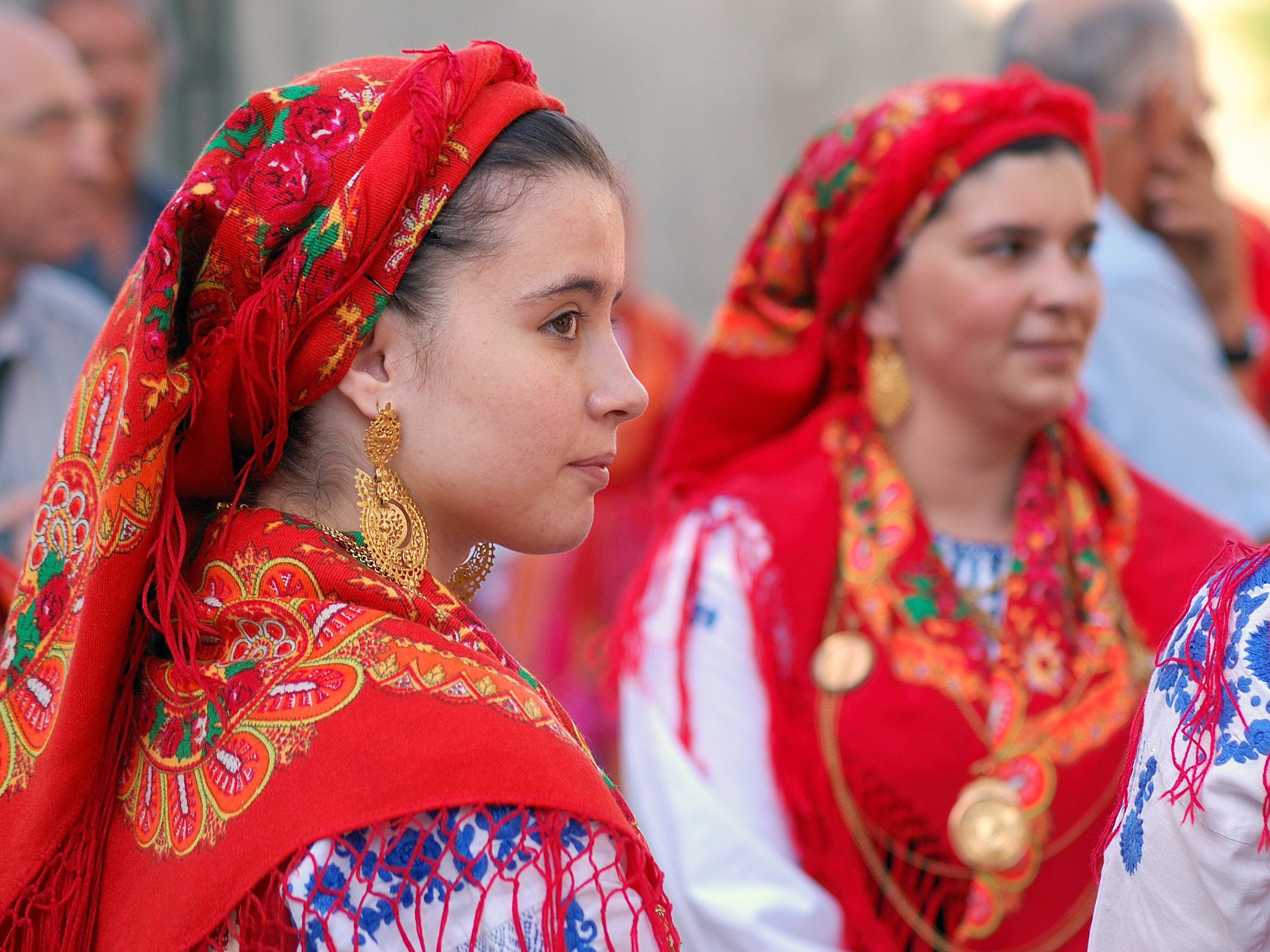 Viana do Castelo, Portugal [2010]